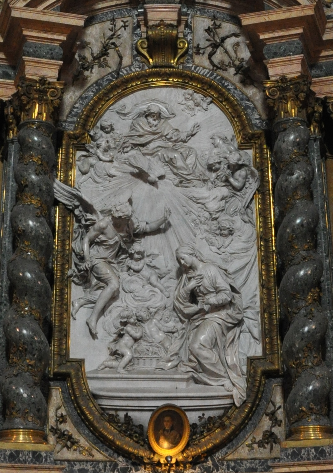 Chiesa di Sant'Ignazio, Roma: Filippo della Valle – Annunziata